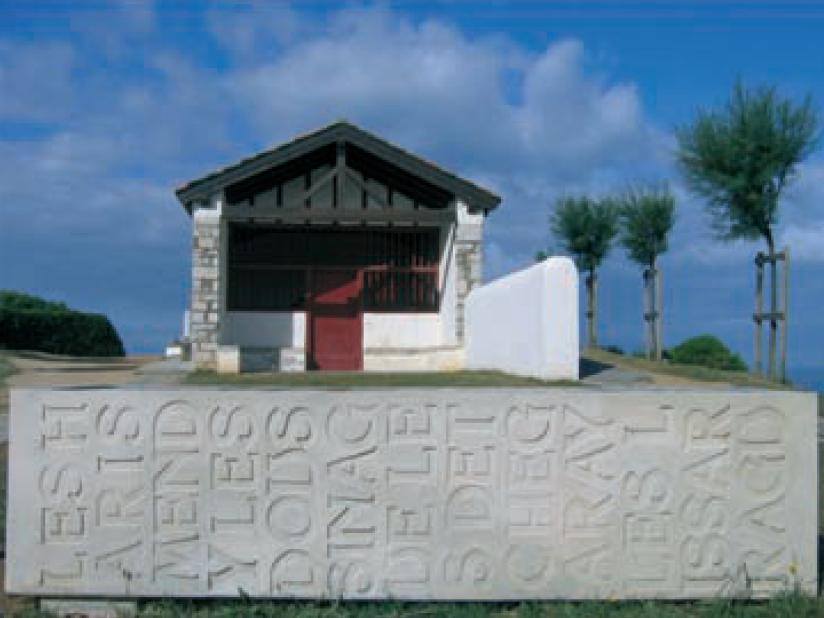 Monumento a los corsarios y navegantes vascos en Bidarte (Lapurdi) Cara 1 : “LES HARISMENDY LES DOUSSINAGUE LES DETCHEVERRY LES LISSARAGUE” Cara 2 : “LES MENDISABAL” Cara 3 : “PICON LES BOMBALIERS LES LARREGUY LES DETCHEBEHERE LES HIRIGOYENS” Cara 4 : “LES DAGUERRE”